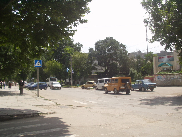 Крым. г.Джанкой. Улица Ленина